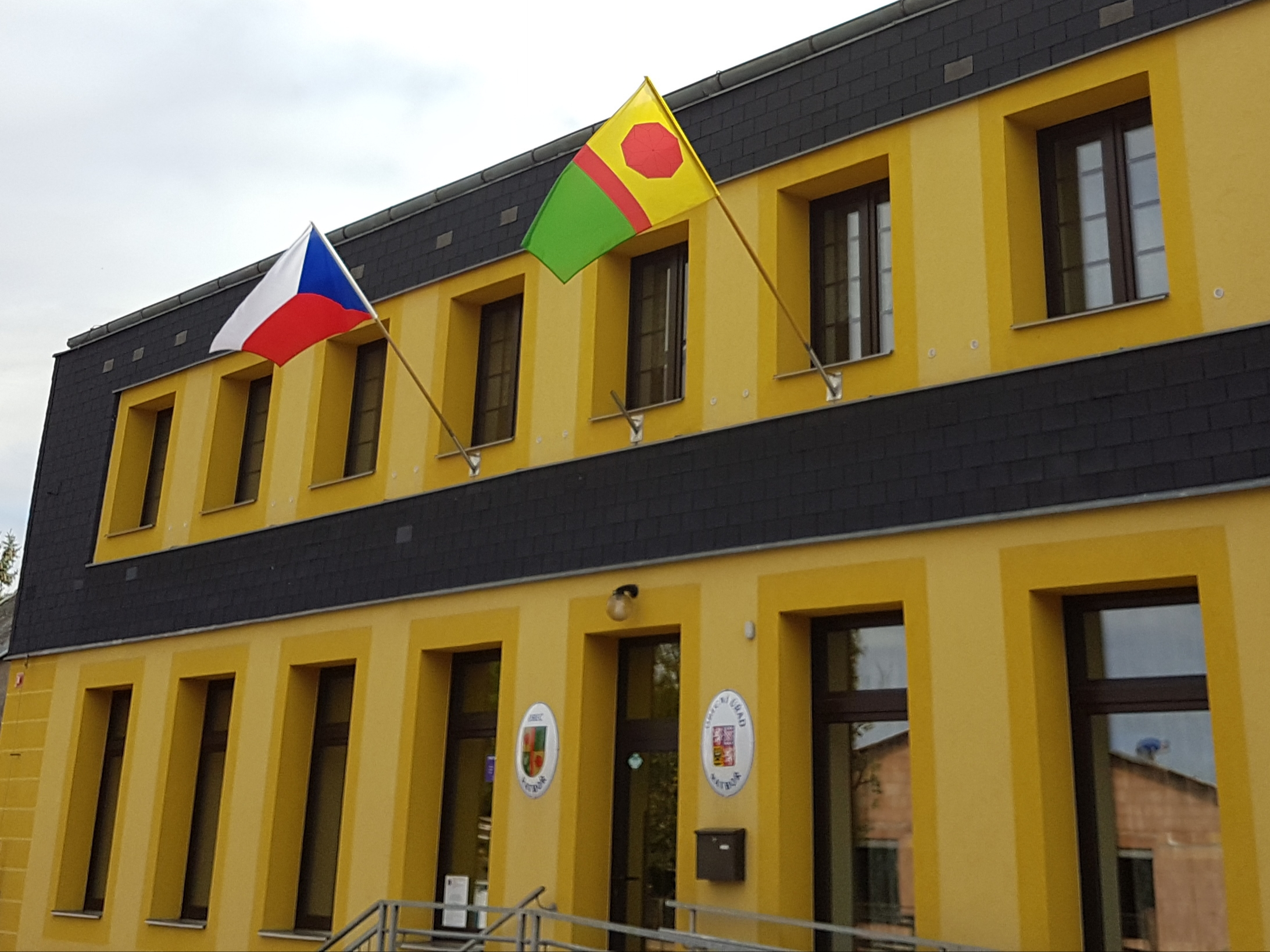 Vlajka a znak